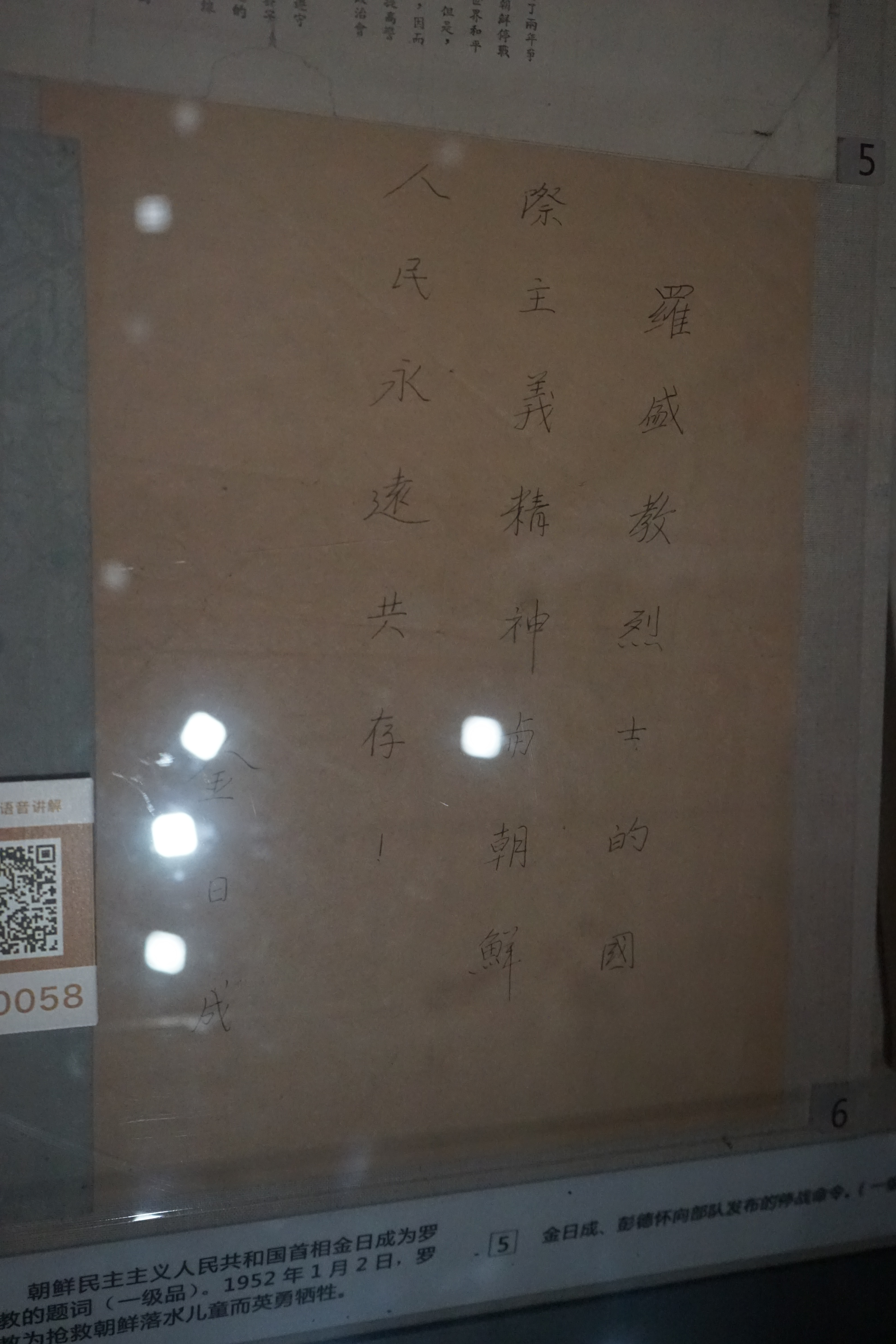 朝鲜民主主义人民共和国首相金日成为罗盛教的题词。一级文物。1952年1月2日罗盛教为抢救朝鲜落水儿童牺牲。